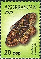 Kəpənəklər